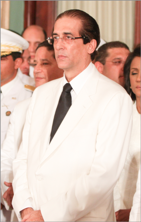 Gustavo Montalvo Franco